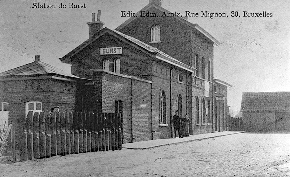 Le bâtiment d'origine de la gare de Burst en Belgique